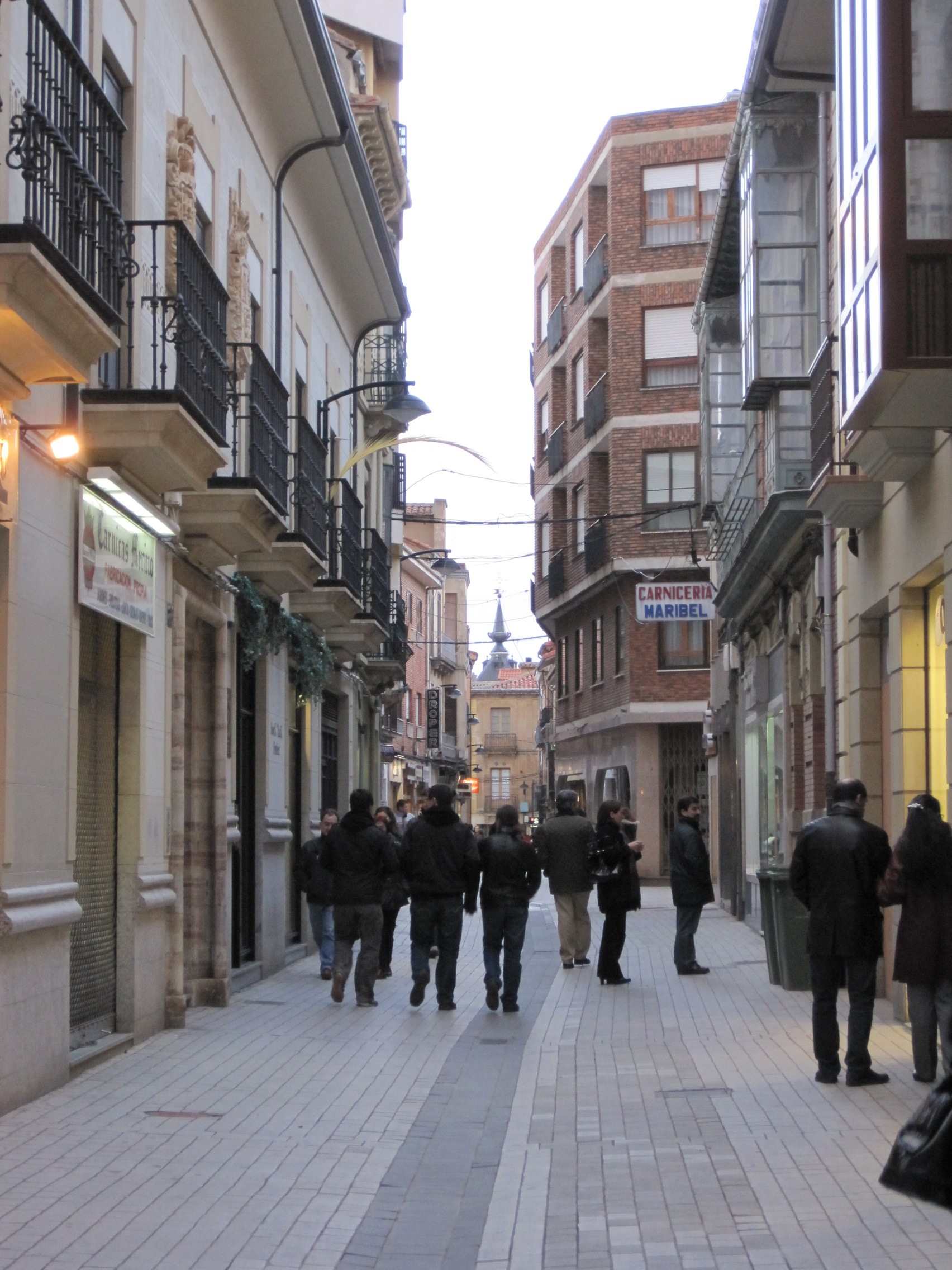 Calle Pío Gullón, Astorga (León, España).